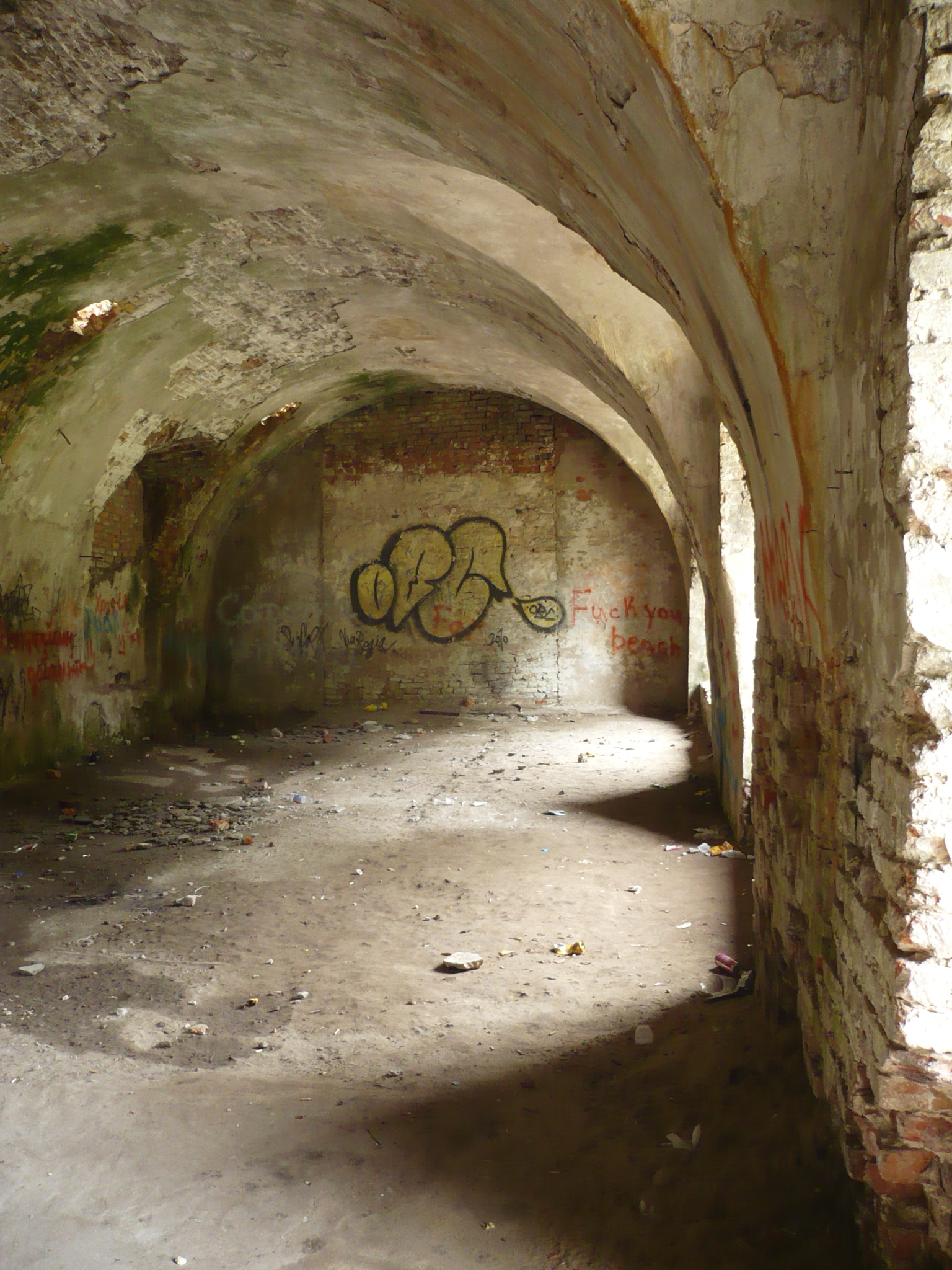 Kazamaty w Brodach